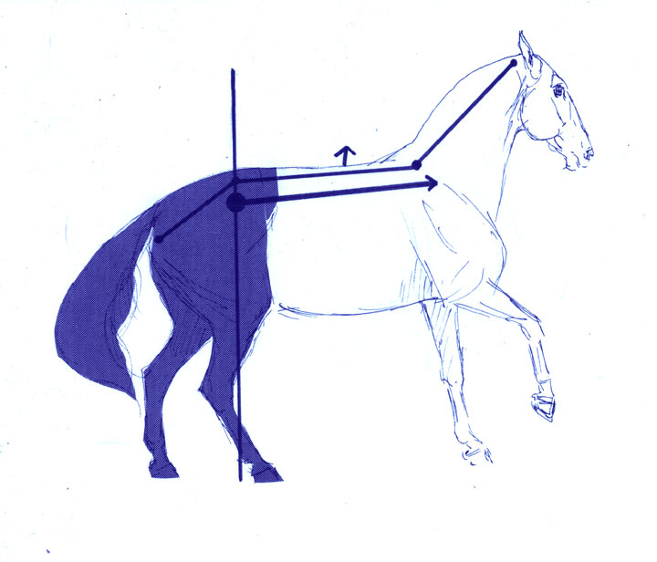 Fixierung auf der Hinterhand = angehobene Schulter